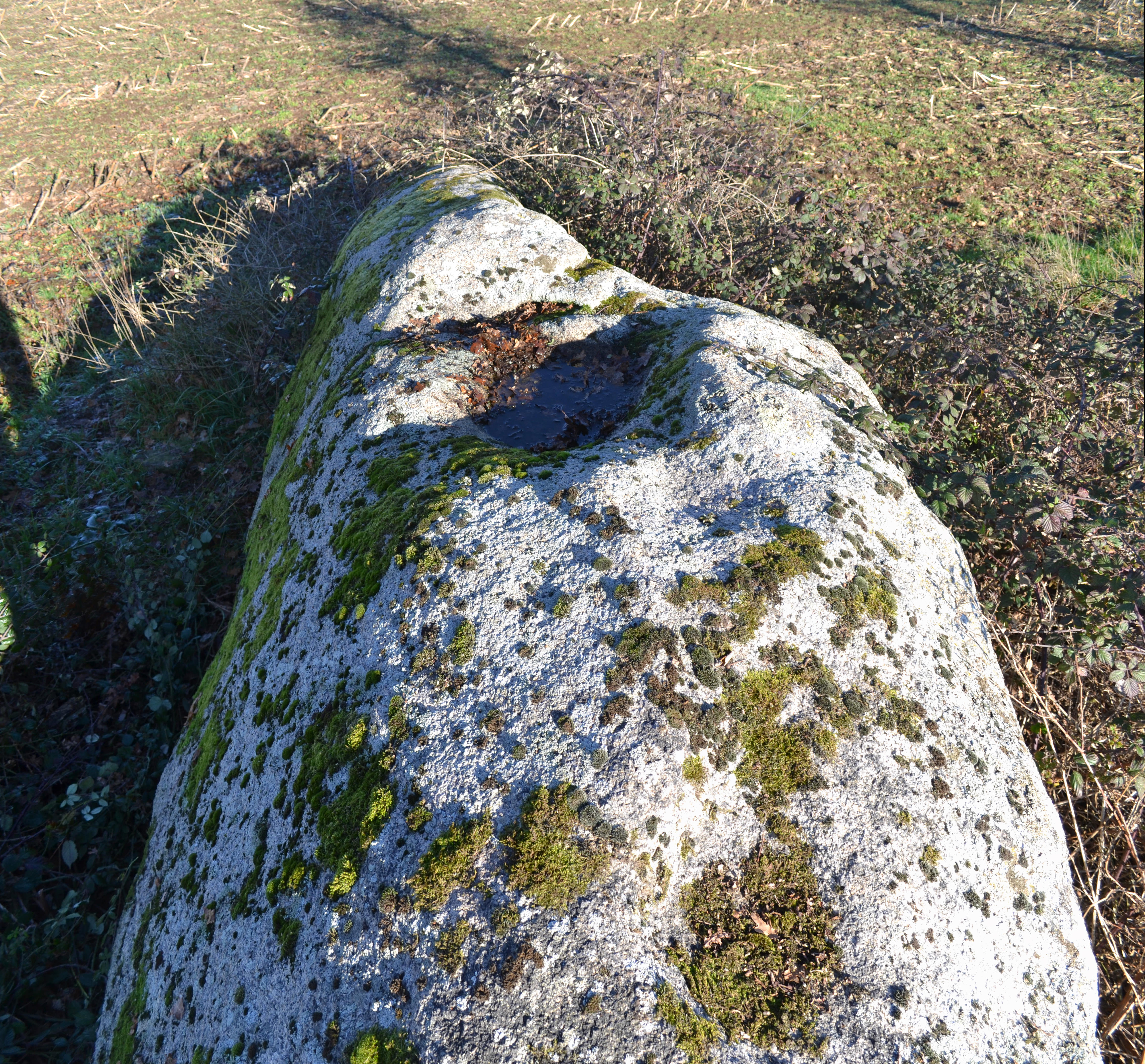 Menhir couché du moulin à vent de Normandeau, La Reandudière (49). Classé monument historique.